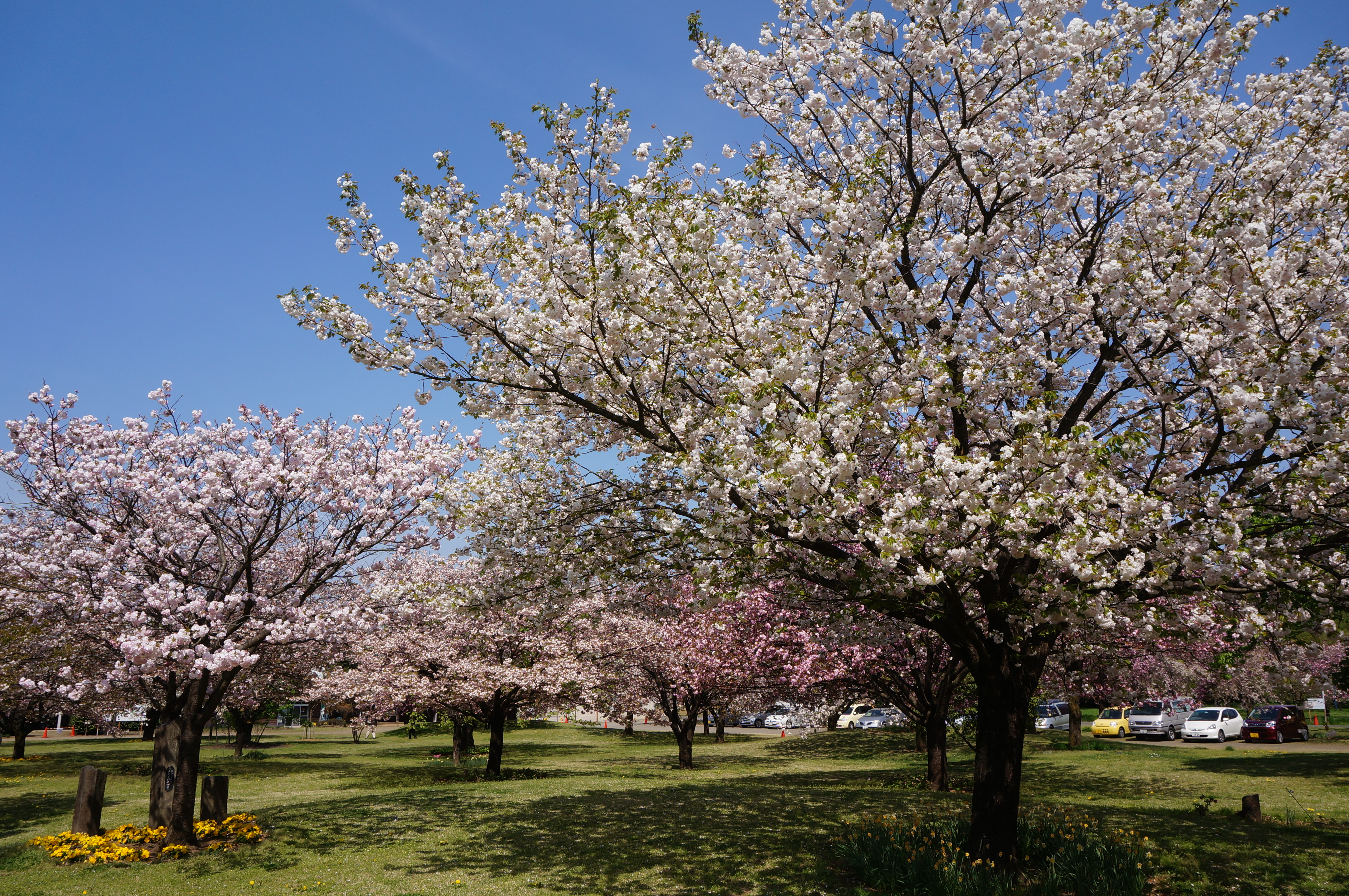 Cherry blossom "Ichiyo" and "Fukurokju". The Flower Association of Japan. Yūki city, Ibaraki prefecture, Japan.